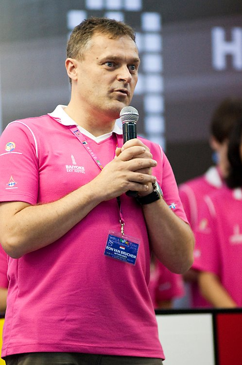 Ron van Bruchem